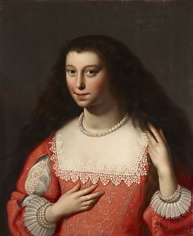 Portret van Maria Elisabeth van den Bergh, markiezin van Bergen op Zoom door een onbekende schilder.